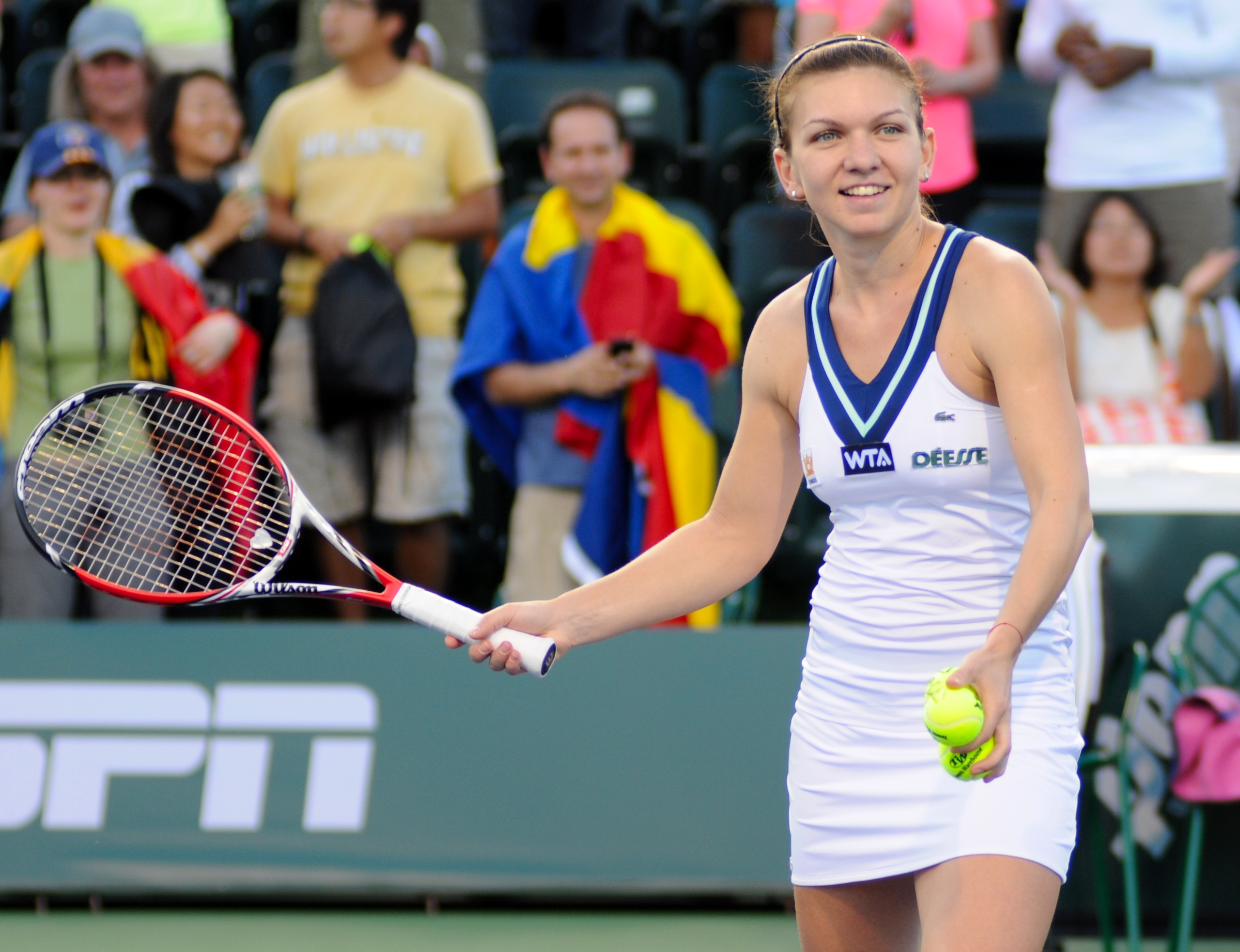 2014 BNP Paribas Open